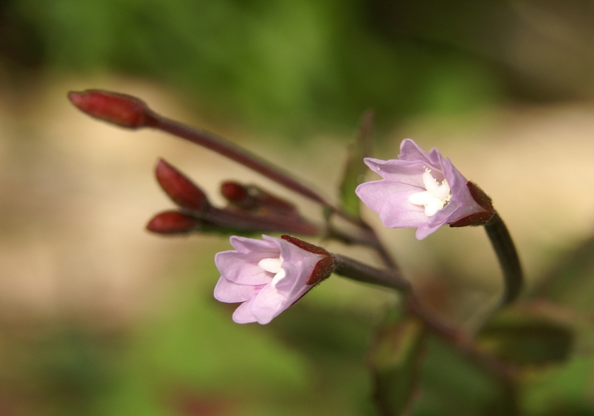 Gorski vrbovec na Veliki planini.